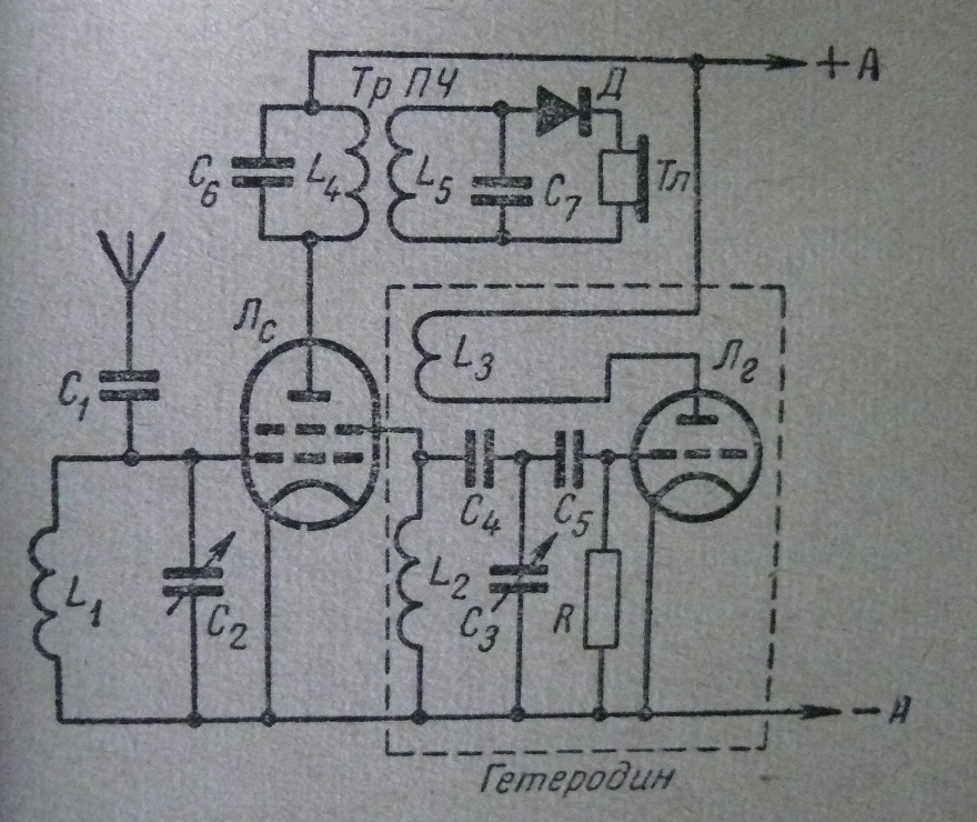 Схема лампового супергетродина